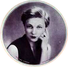 photo de Sidonie Baba